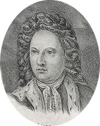 Gustaf Adolf De la Gardie (1647-1695)